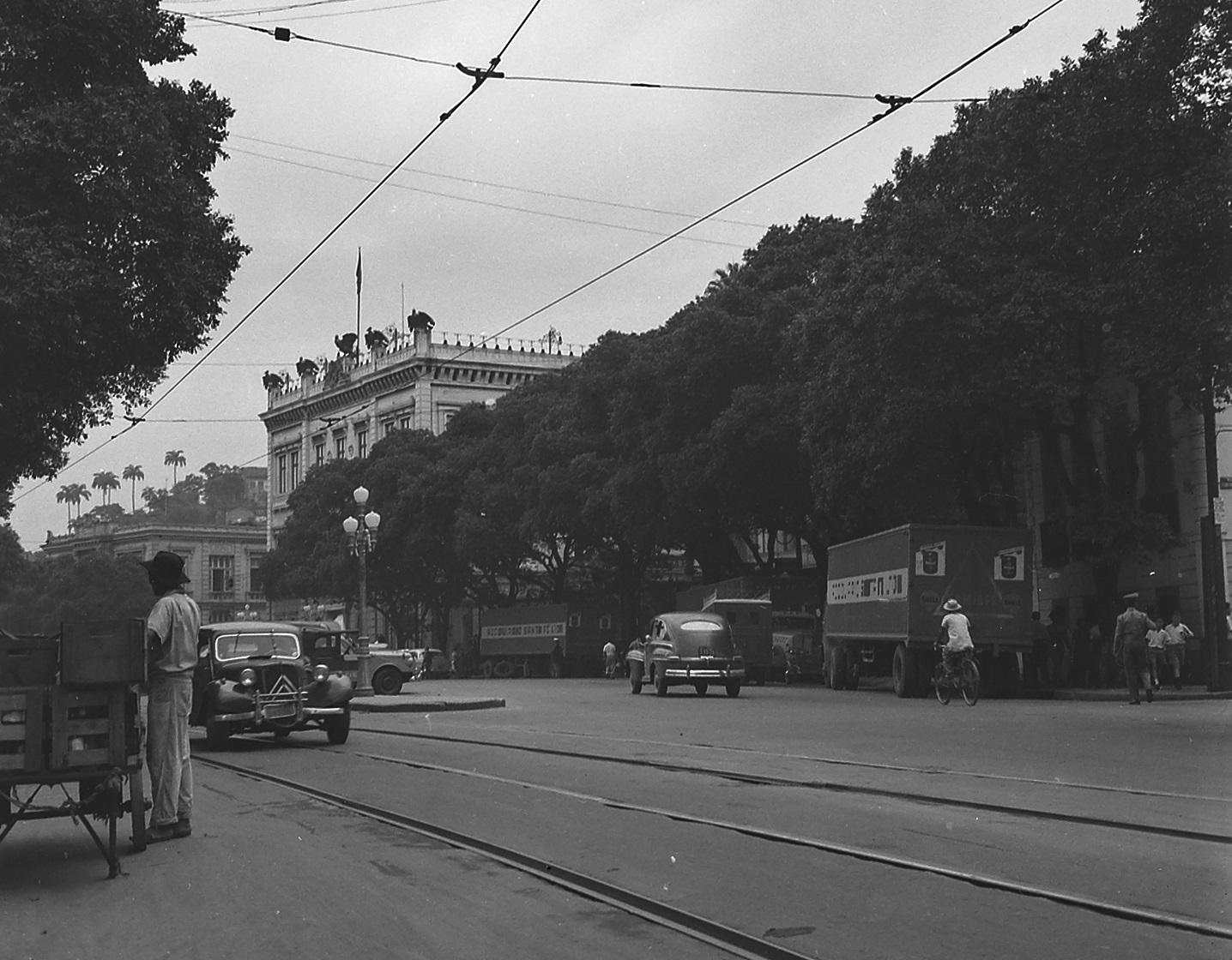 Imagem do Fundo Agência Nacional, do Arquivo Nacional